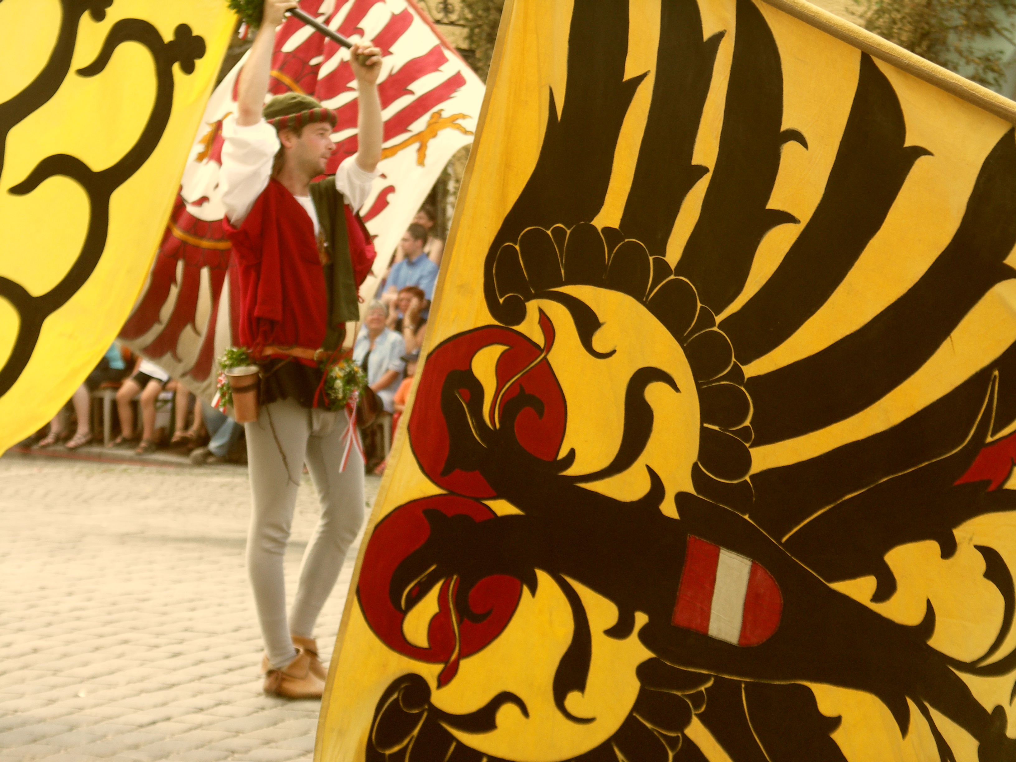 Landshut (Germany) Image from Landshuter Hochzeit 2005